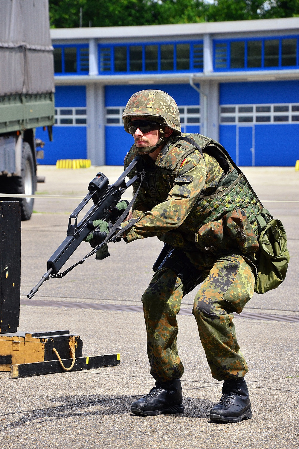 Bundeswehrsoldat, bewaffnet mit Gewehr G36 und Pistole P8. Sanitätsregiment 22, Westfalenkaserne, Ahlen, Nordrhein-Westfalen, Deutschland.